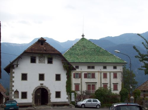 Mione di Ovaro (UD-Friuli Venezia Giulia-Italia) Palazzo Micoli Toscano e fienile settecentesco